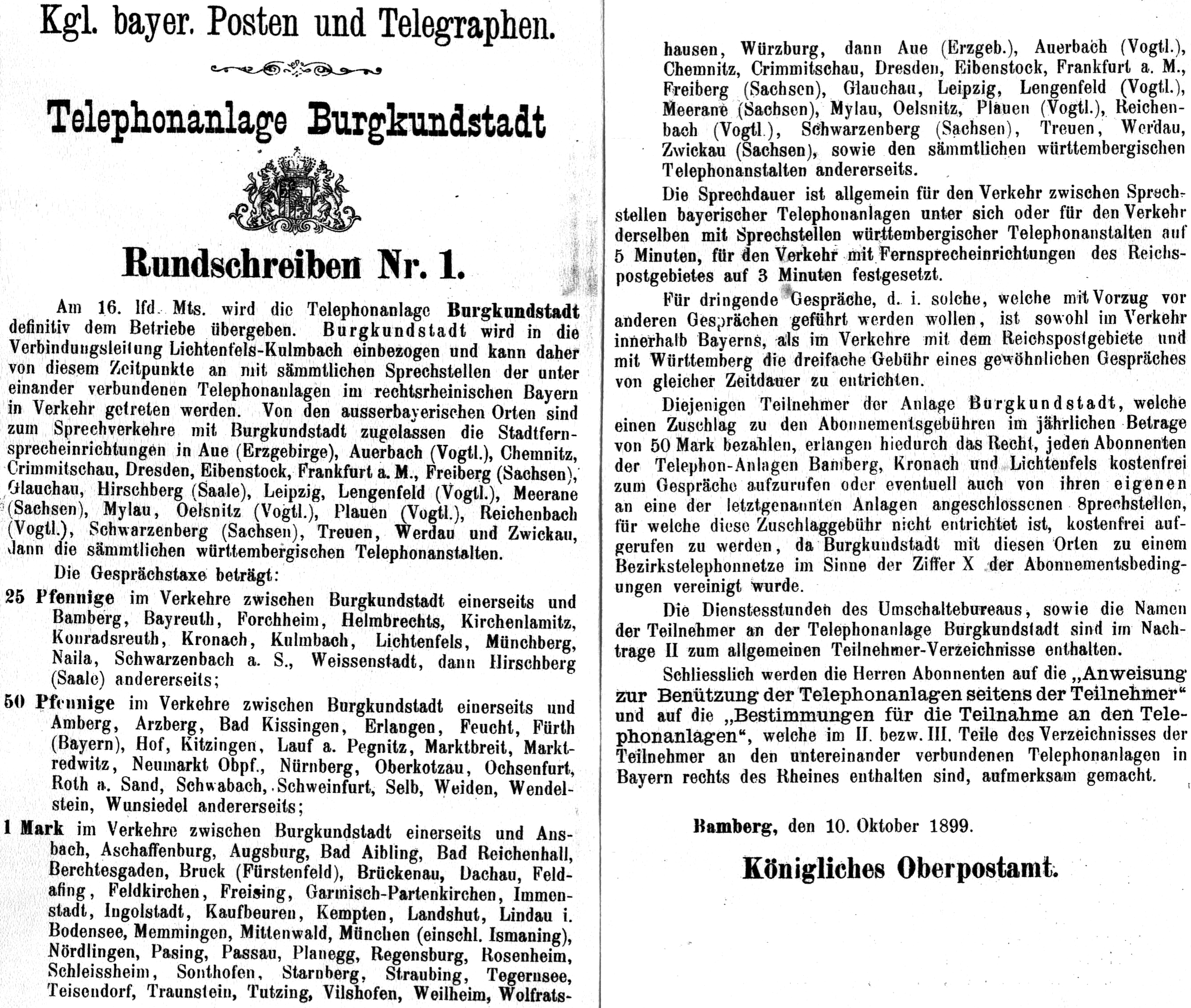 Zeitungsartikel über die Telefonalage in Burgkunstadt